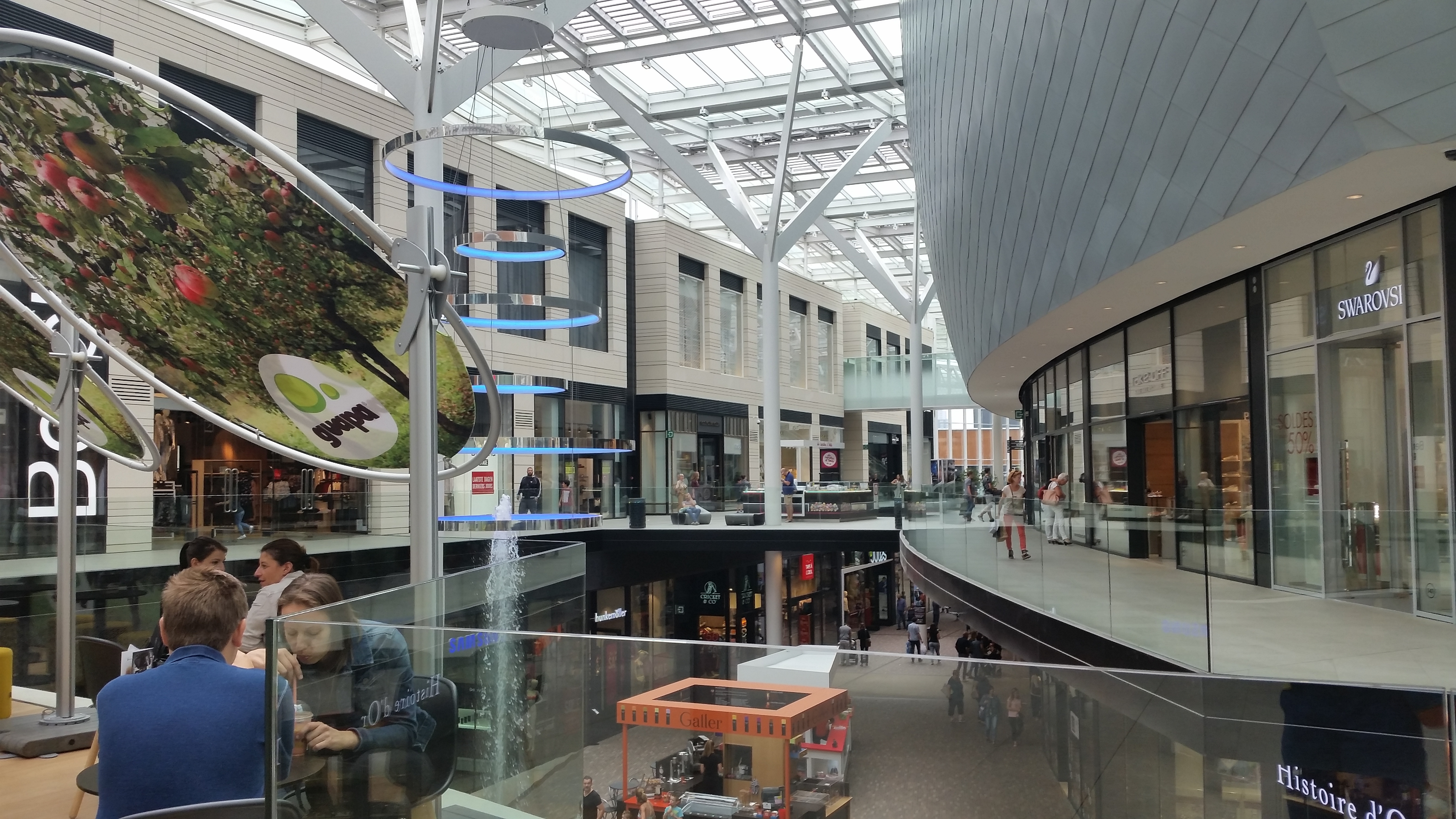 Docks Brussels intérieur vu de haut